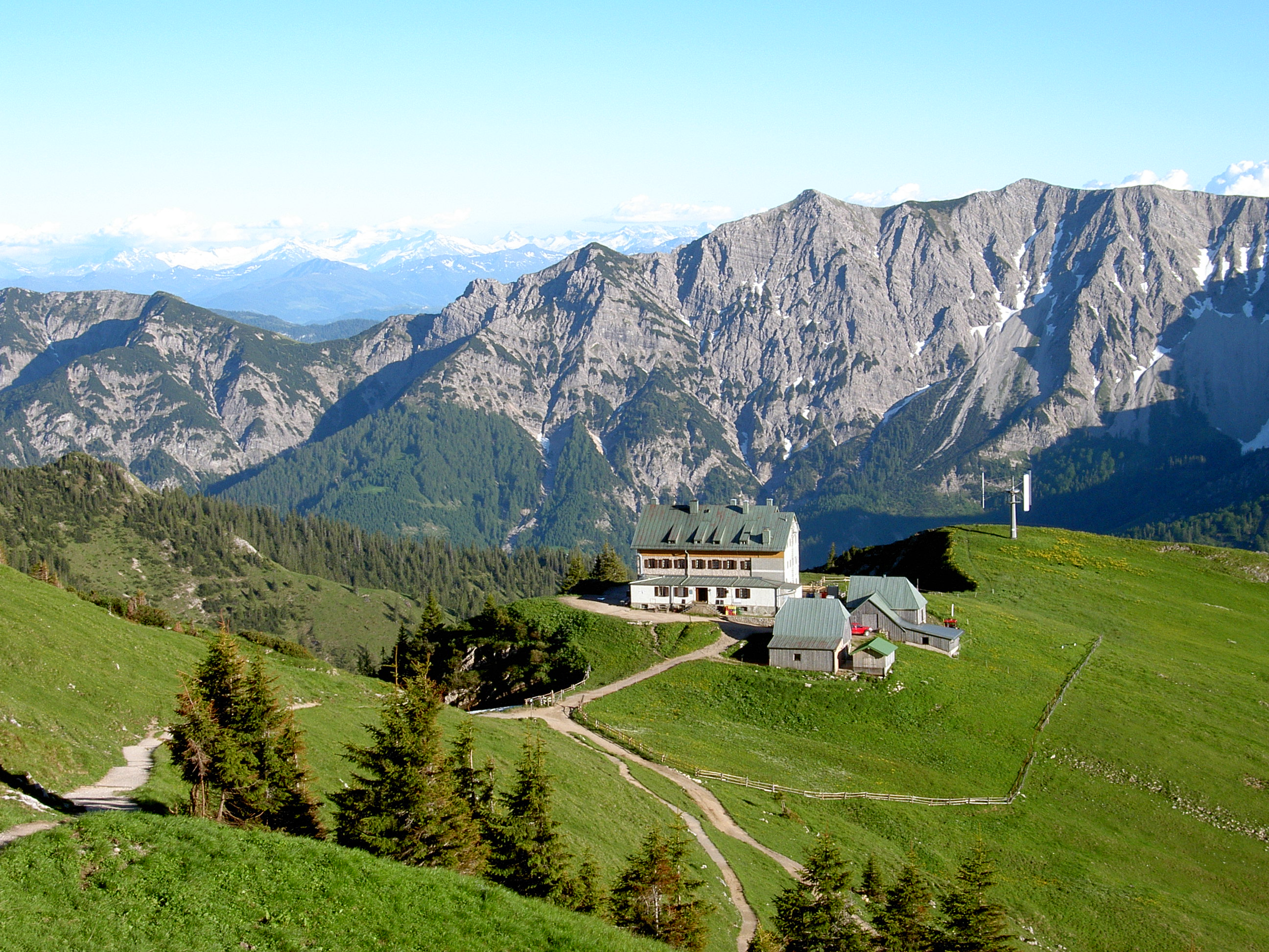 Rotwandhaus - Blick vom Weg zum Gipfel der Rotwand eigenes Bild erstellt am 19. Juni 2006 von Michael Dommel own work - made on June 19th 2006 by Michael Dommel (Germany, Bavaria)